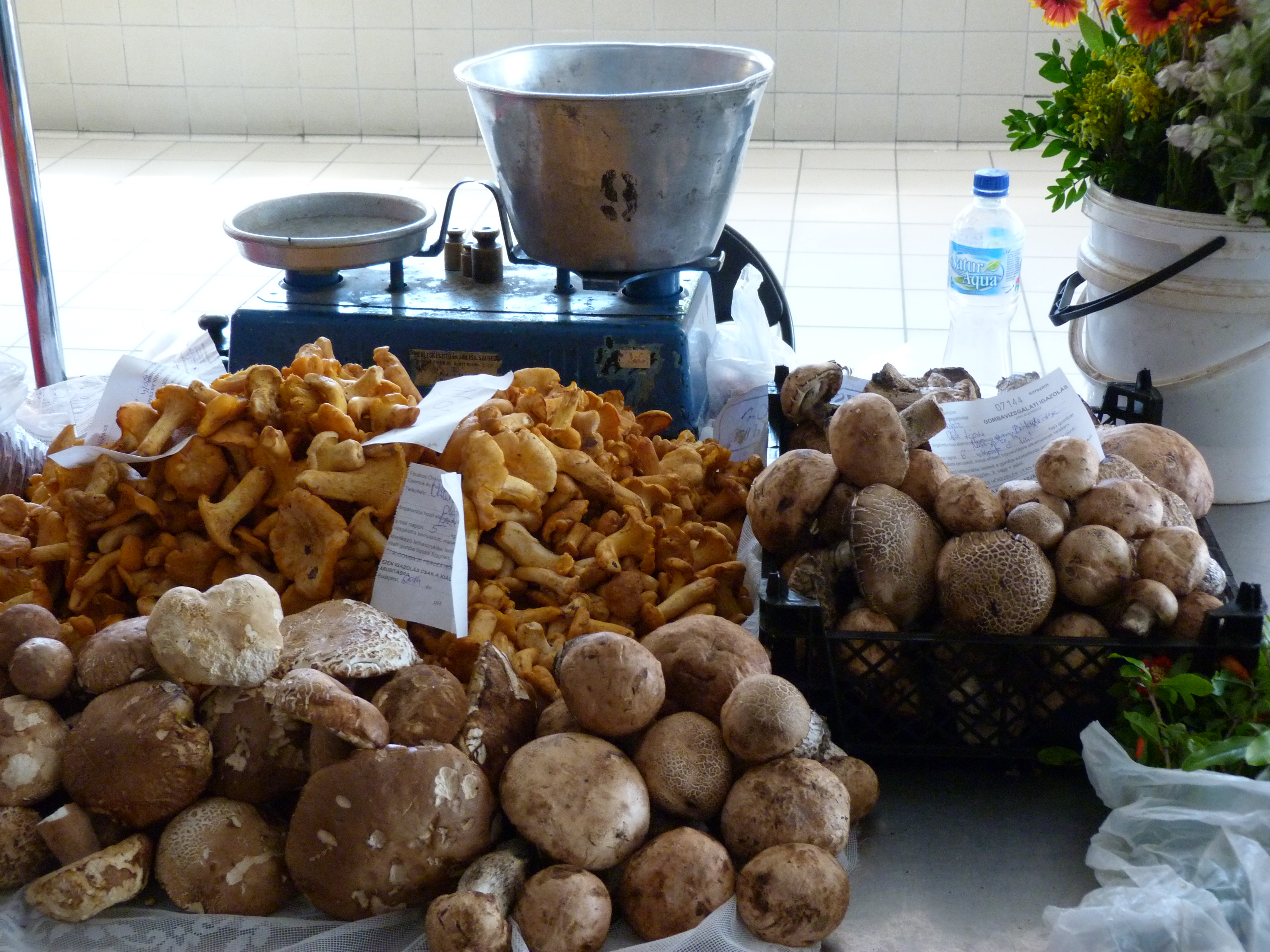 Sárga rókagomba a Nagycsarnokban. A felvétel 2014. június 13-án készült